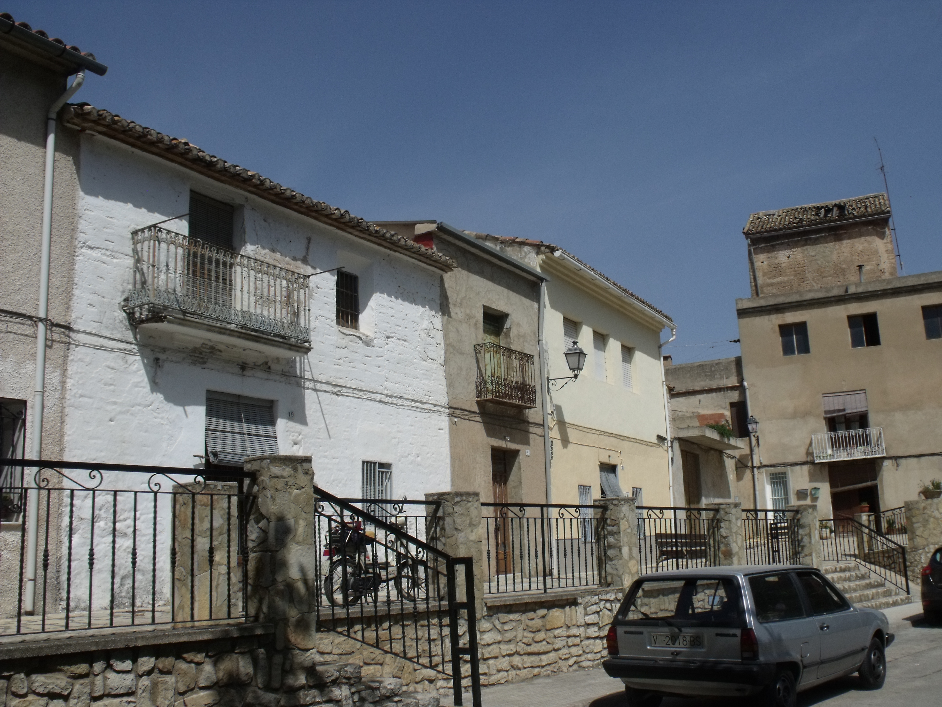 Torre d'Alfauir y Antiguas casas señoriales de Alfahuir